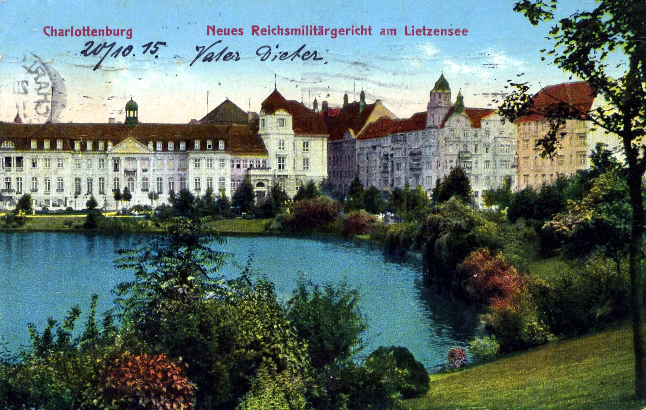 Reichsmilitärgericht am Lietzensee in Charlottenburg